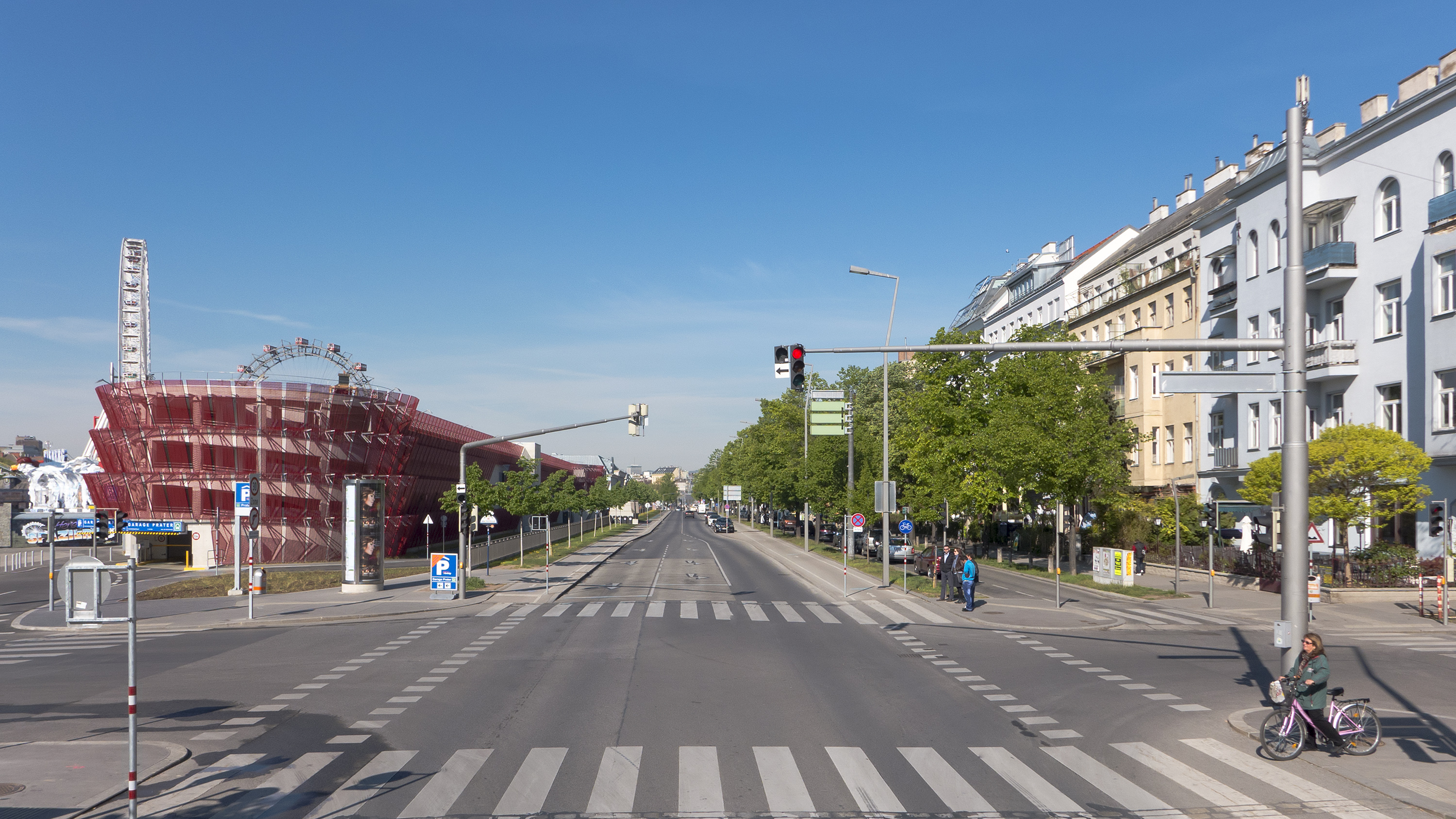 Ausstellungsstraße in Wien 2 bei der Molkereistraße Richtung Westen